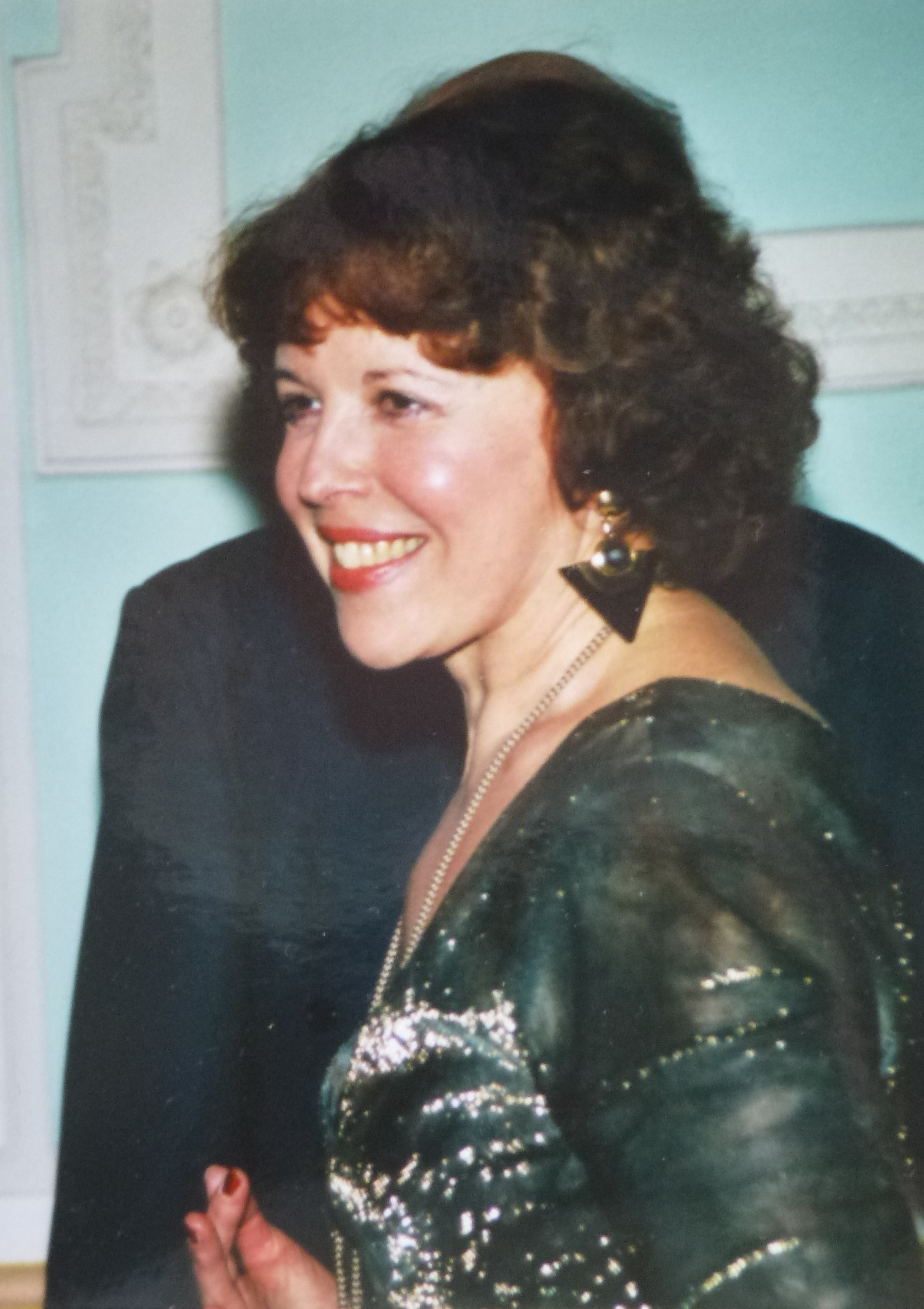 Konzertfoto